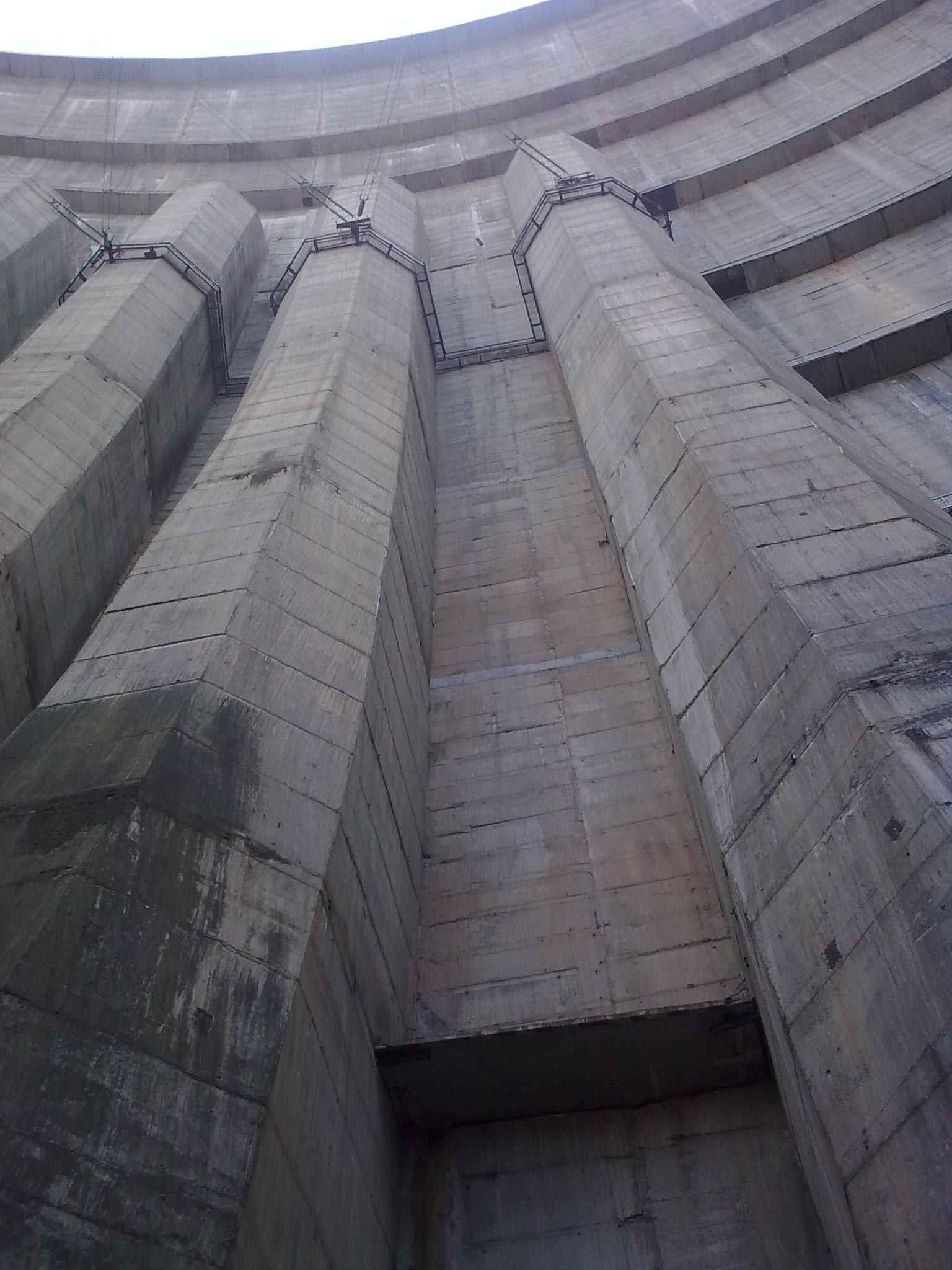 Плотина Чиркейской ГЭС (вид от подножья)